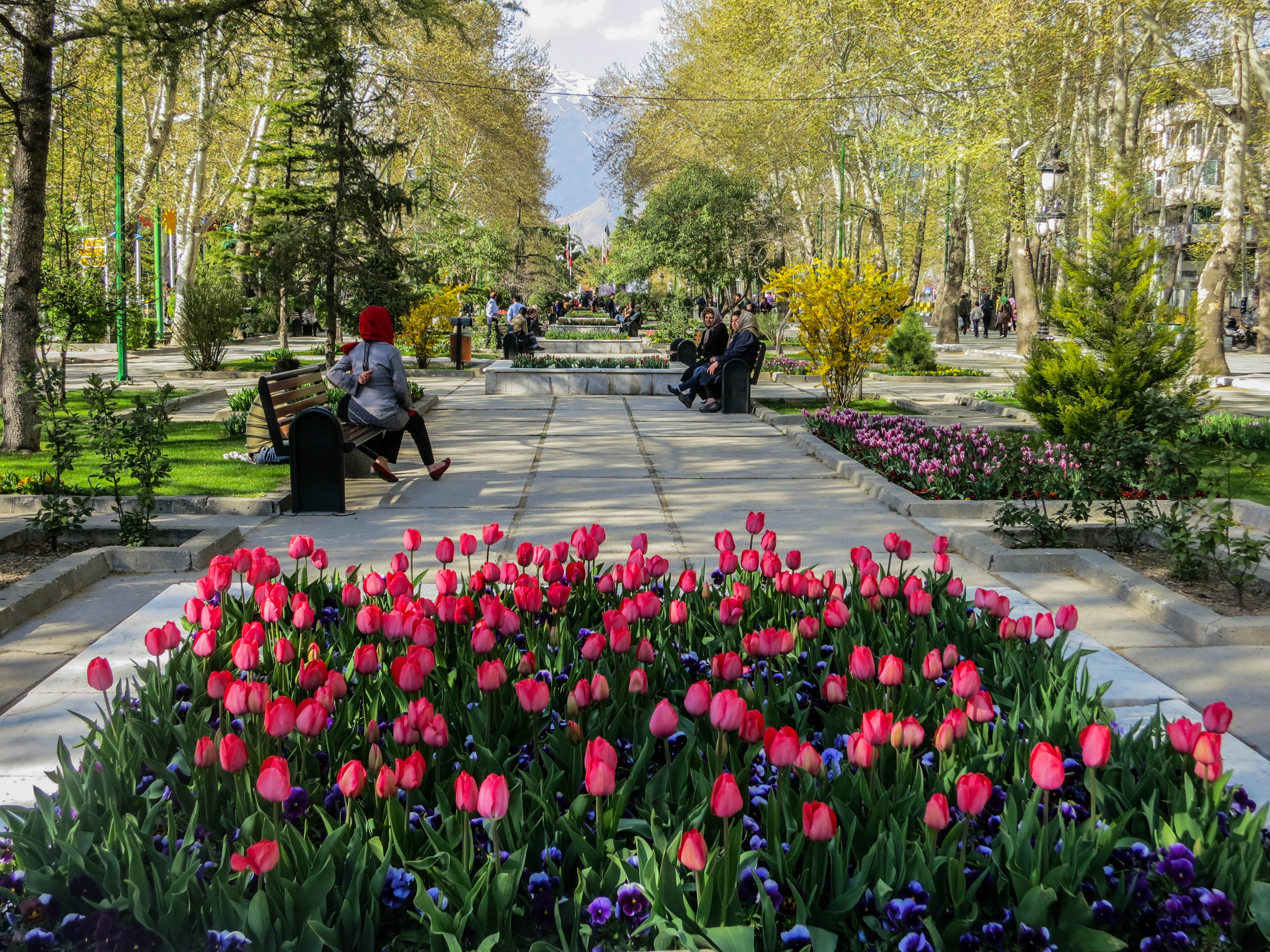 Mellat Park, Valiasr St. during Nowruz, Tehran, Iran